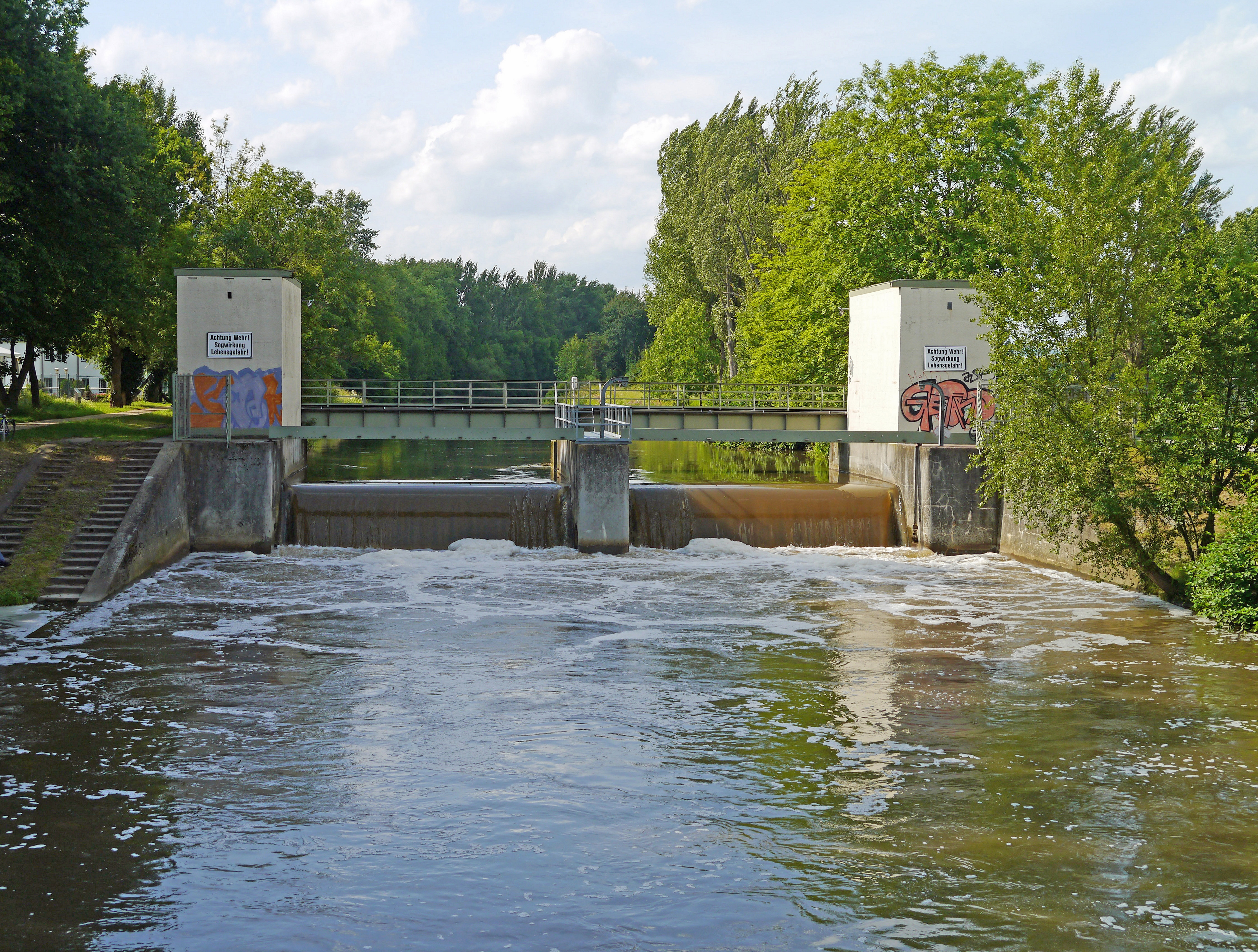 Das Heddernheimer Wehr. 2012 von der Fussgaengerbruecke zum Freibad Eschersheim. An der Stadtteilgrenze Heddernheim/Eschersheim, in Frankfurt am Main.